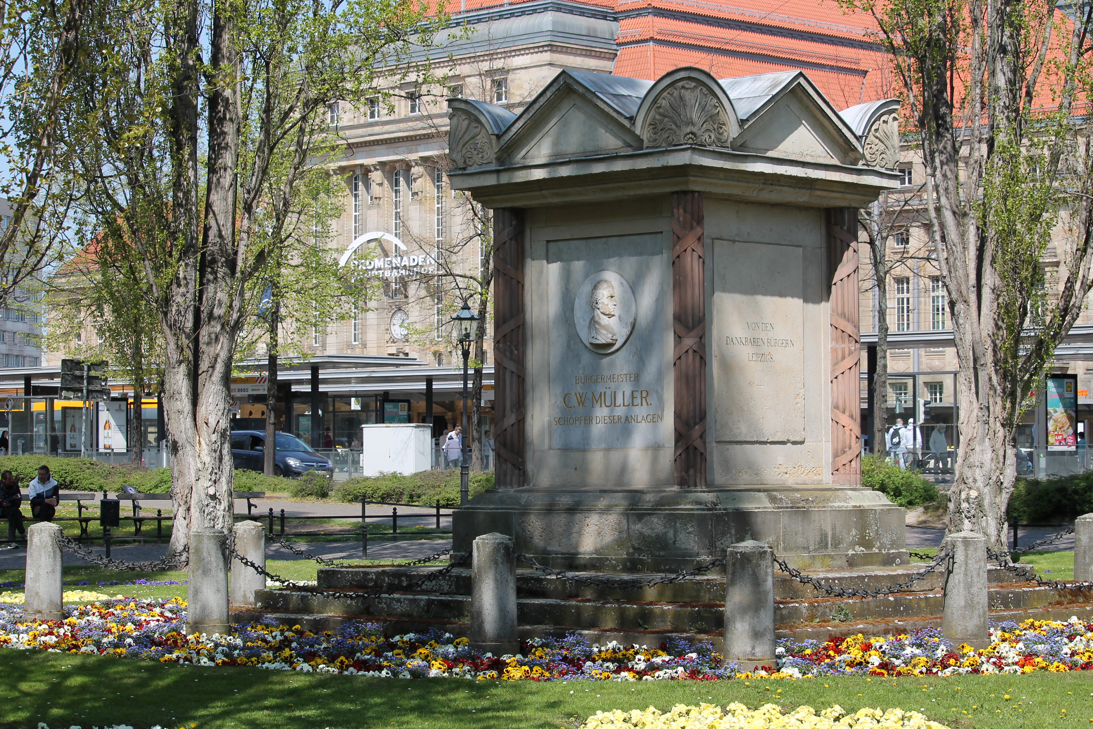 Установленный в 1819 году памятник посвящён памяти лейпцигского бургомистра Карла Вильгельма Мюллера (1728-1801). Находится в парке-променаде напротив здания Главного вокзала